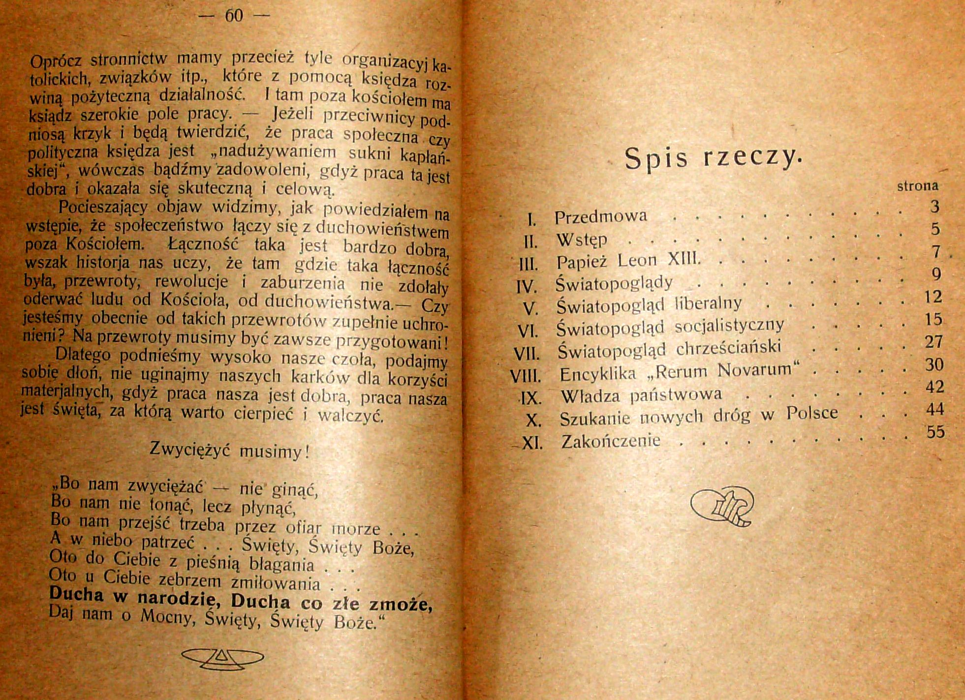 Stanisław Krzyżowski, Rozmyślania w czterdziestą rocznicę encykliki „Rerum novarum”, wydanej 15 maja 1891 r. przez papieża Leona XIII, Pszczyna 1931